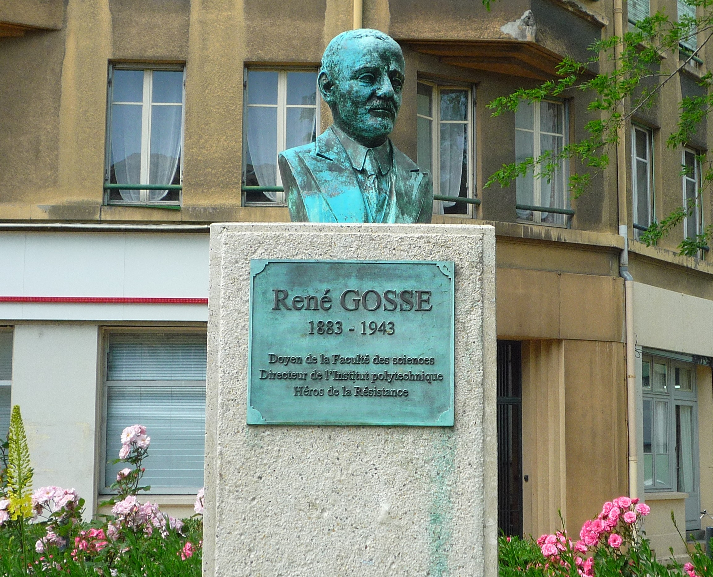 Buste de René Gosse, universitaire et résistant grenoblois, sur la place portant son nom à Grenoble.